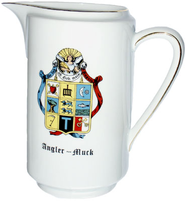 Original Mucktopf